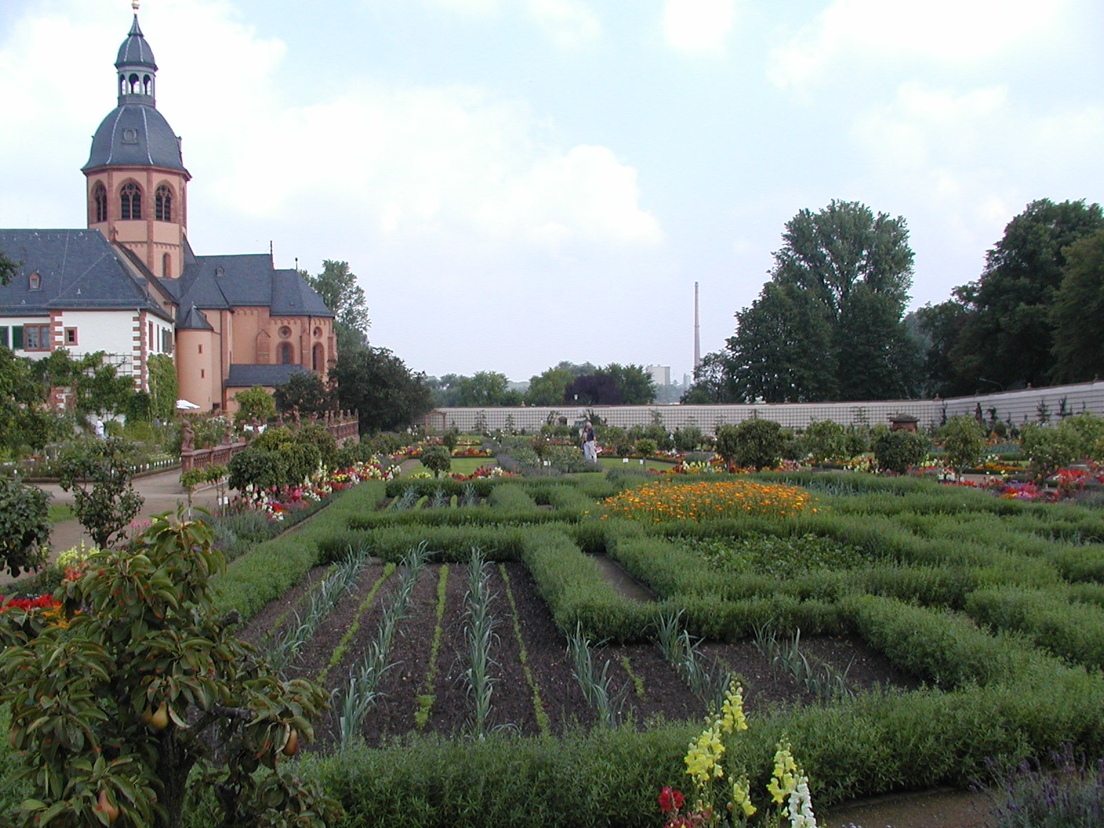 Der Garten der Klosteranlage